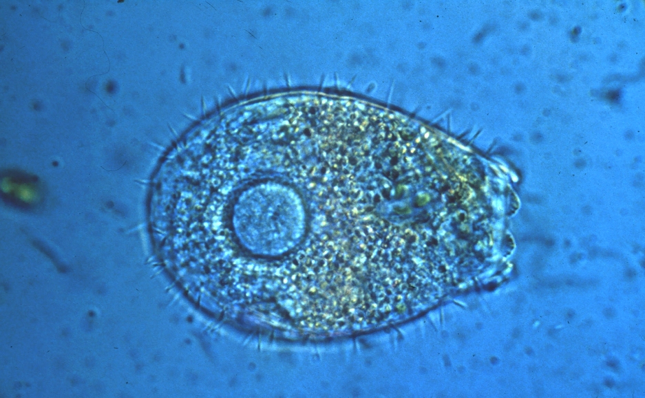 Thekamöbe der Gattung Euglypha